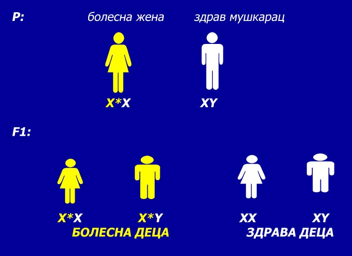 аутор: Снежана Трифуновић